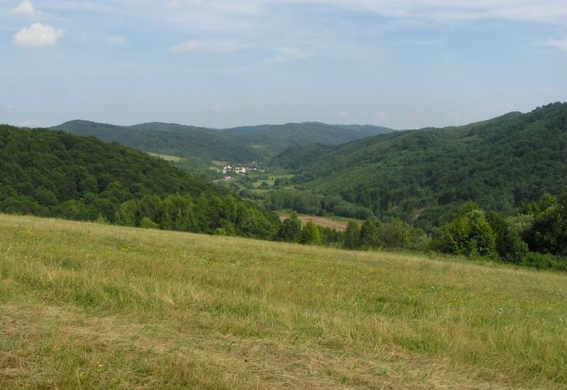 Celkový pohľad